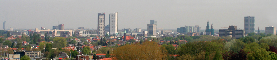 Hoogbouw Eindhoven